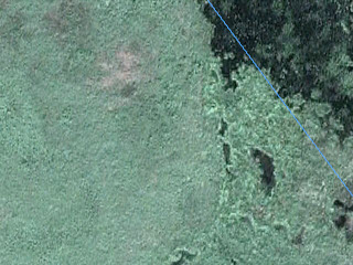 Река Томица